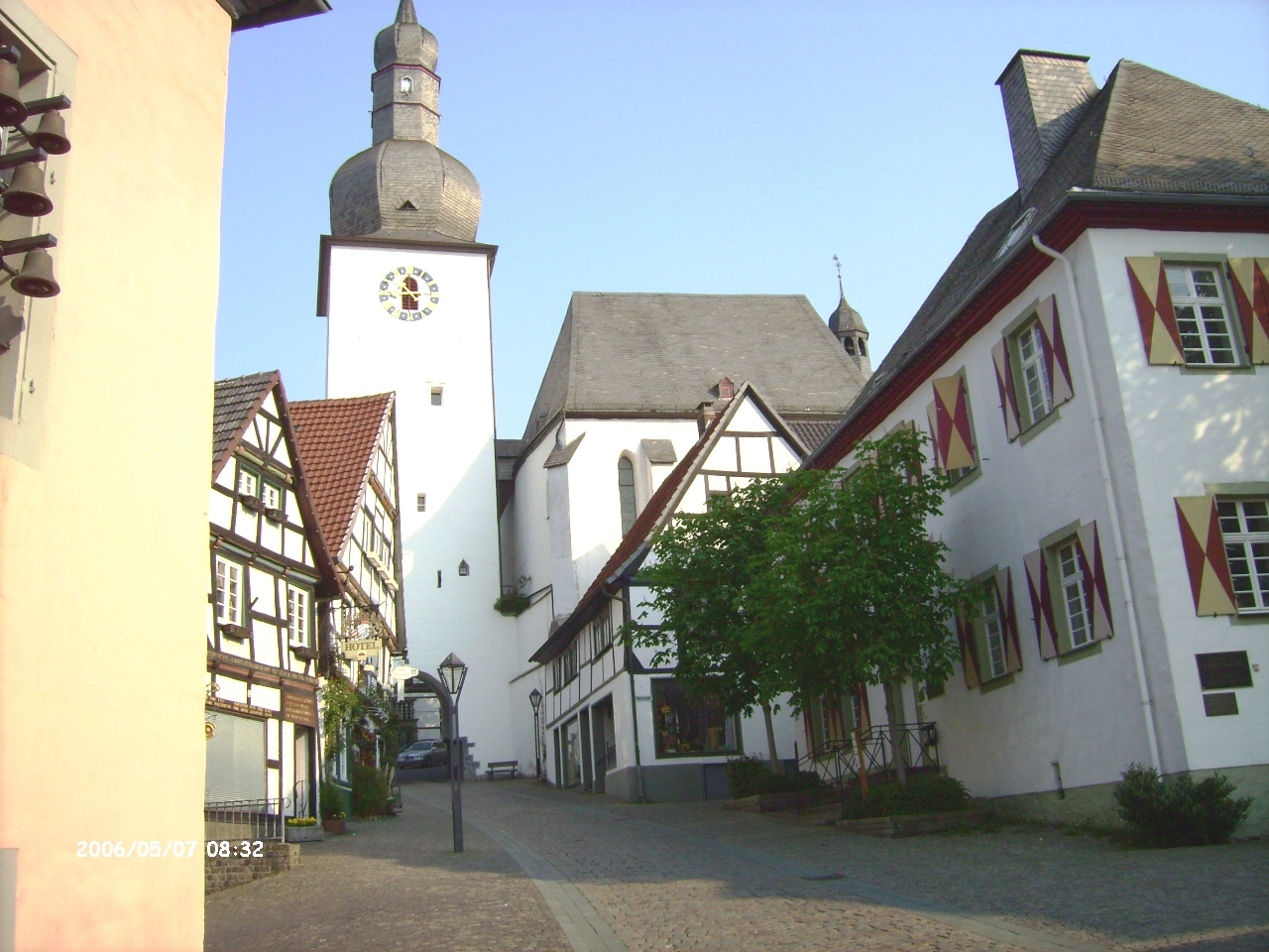 Glockenturm in Arnsberg